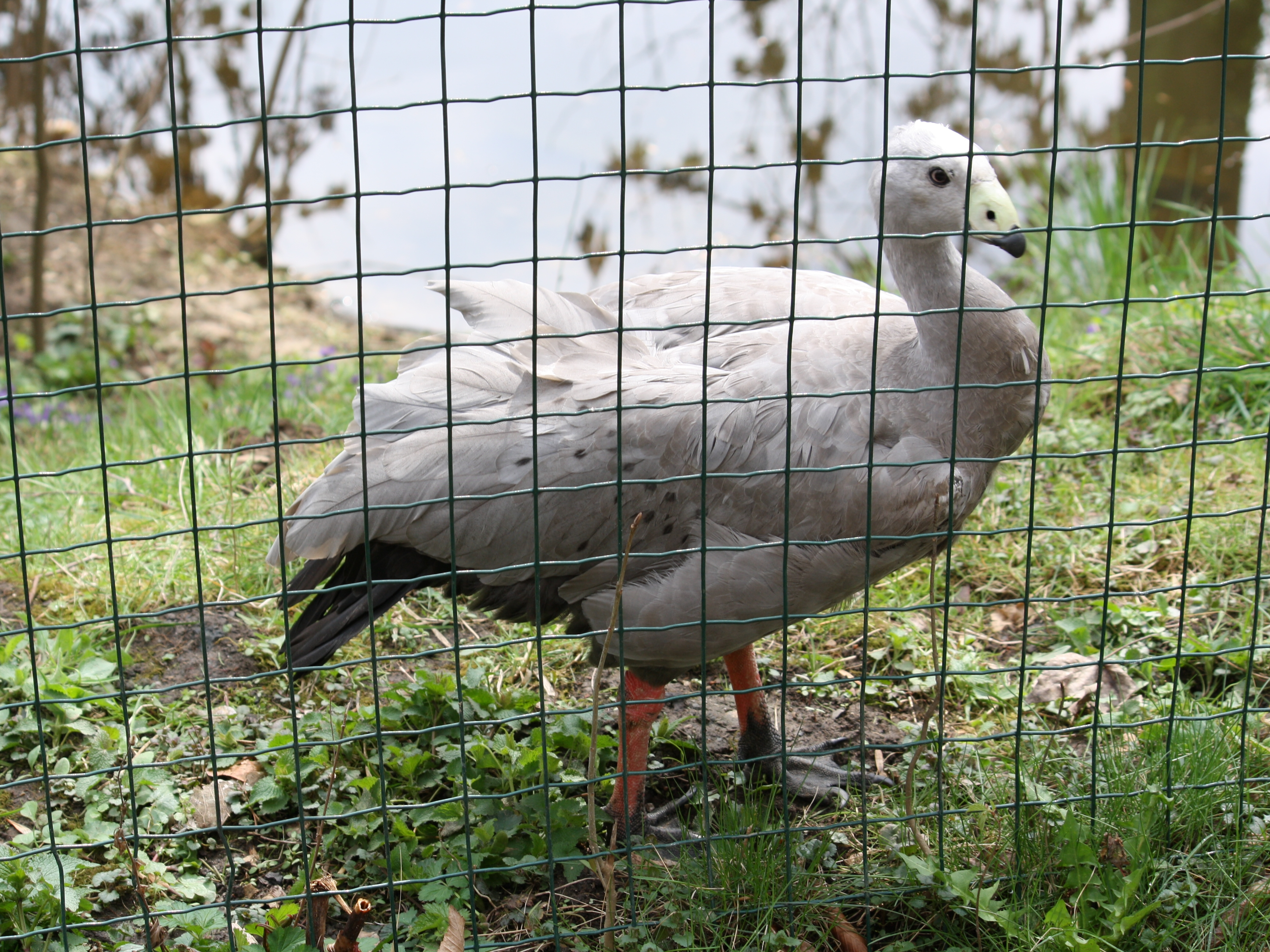 Zoo Praha